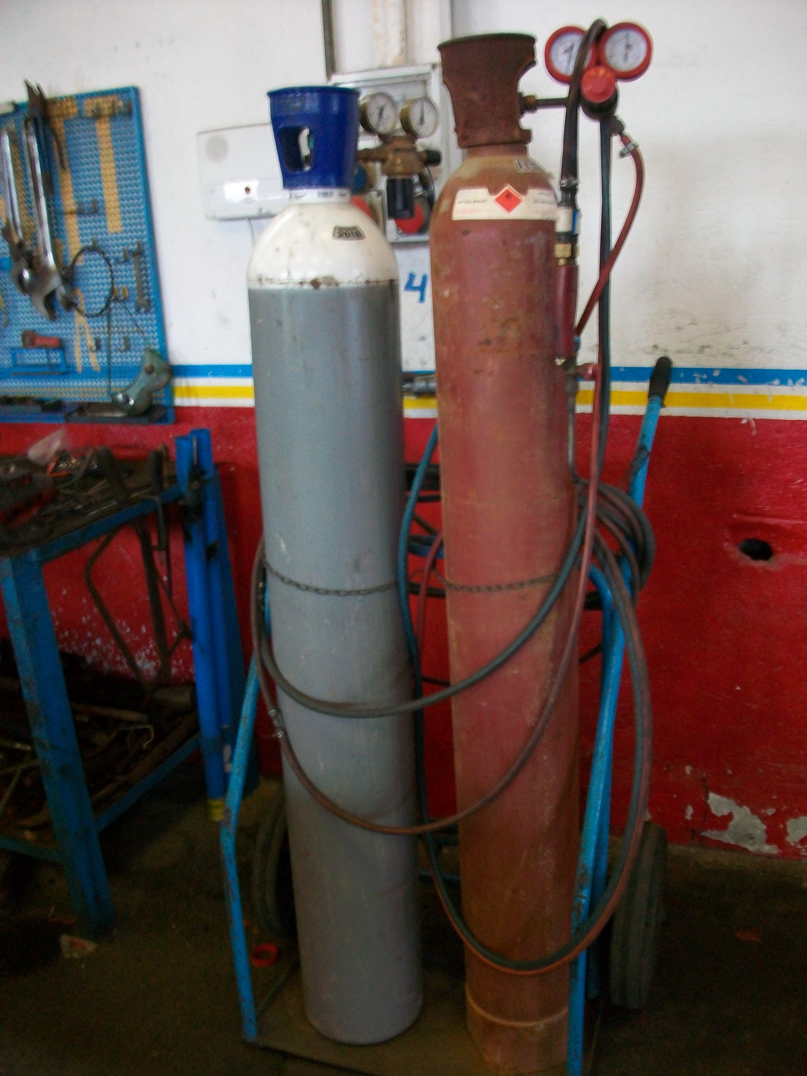 Equipo de soldadura de combustion (autogena)